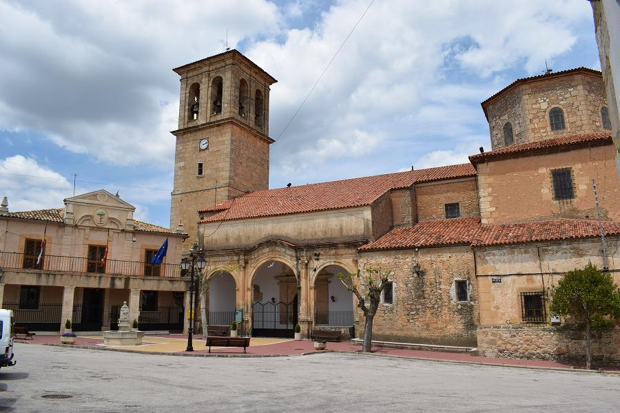 En ella se encuentran la Iglesia de Nuestra Señora de la Asunción y el Ayuntamiento.